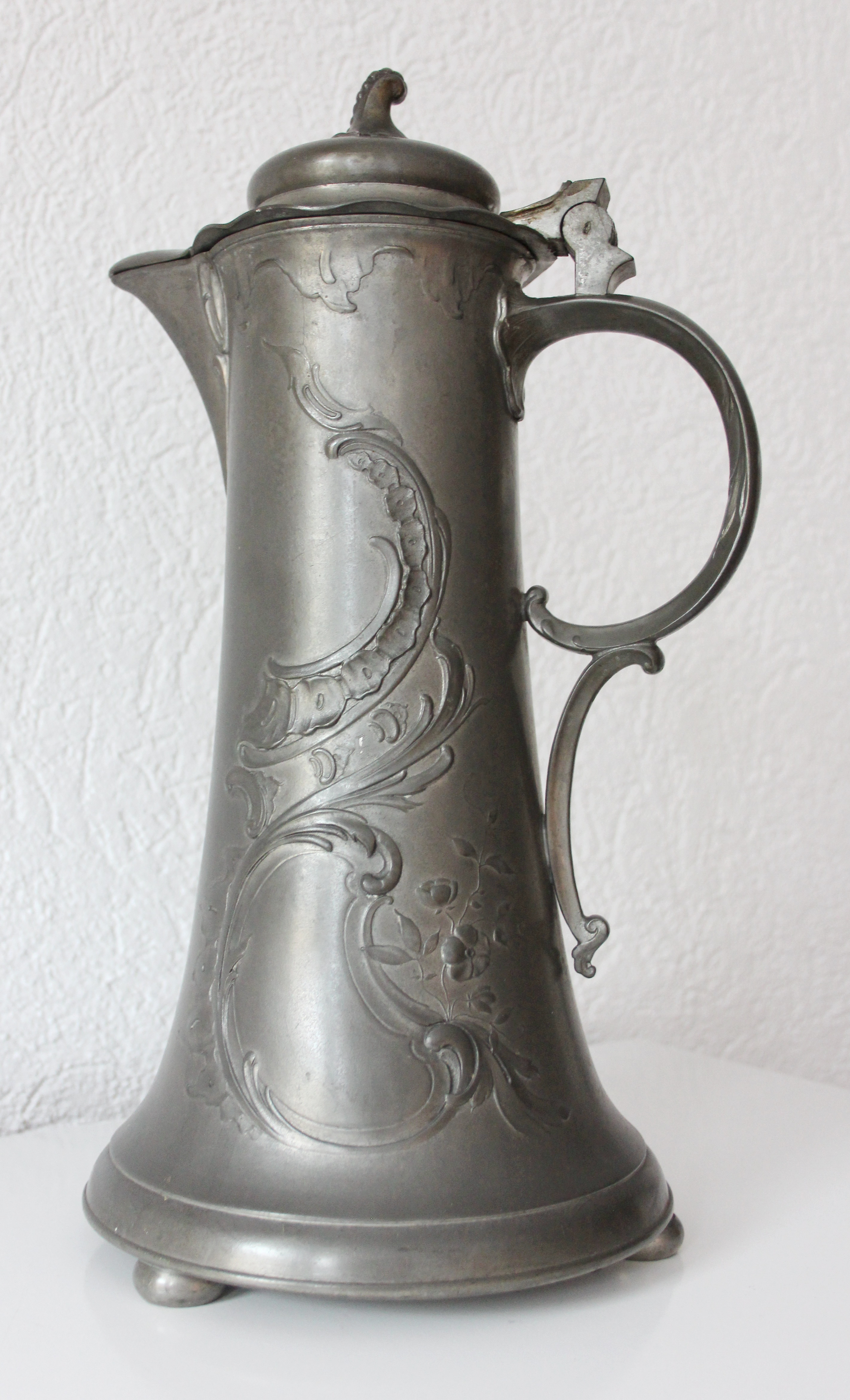 Kayserzinnkanne um 1900 - nummeriert mit 4060